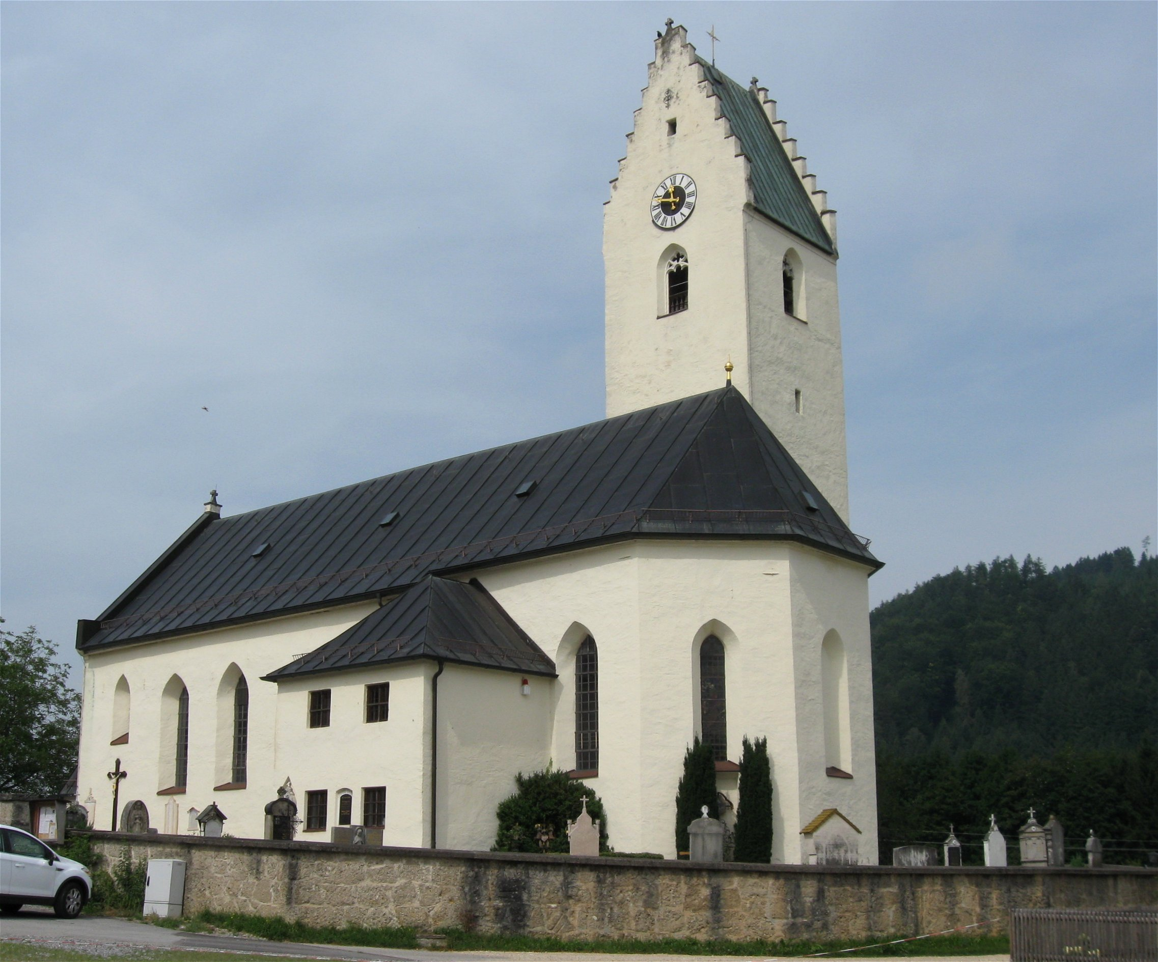 Roßholzen; Filial- und Wallfahrtskirche St. Bartholomäus, Spätgotische Anlage, 15. Jh., Inneres 1755 barockisiert; mit Ausstattung. Friedhof mit Ummauerung.